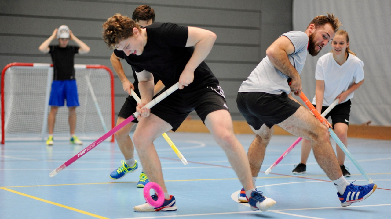 Donut Hockey-Spielszene zweier Mannschaften